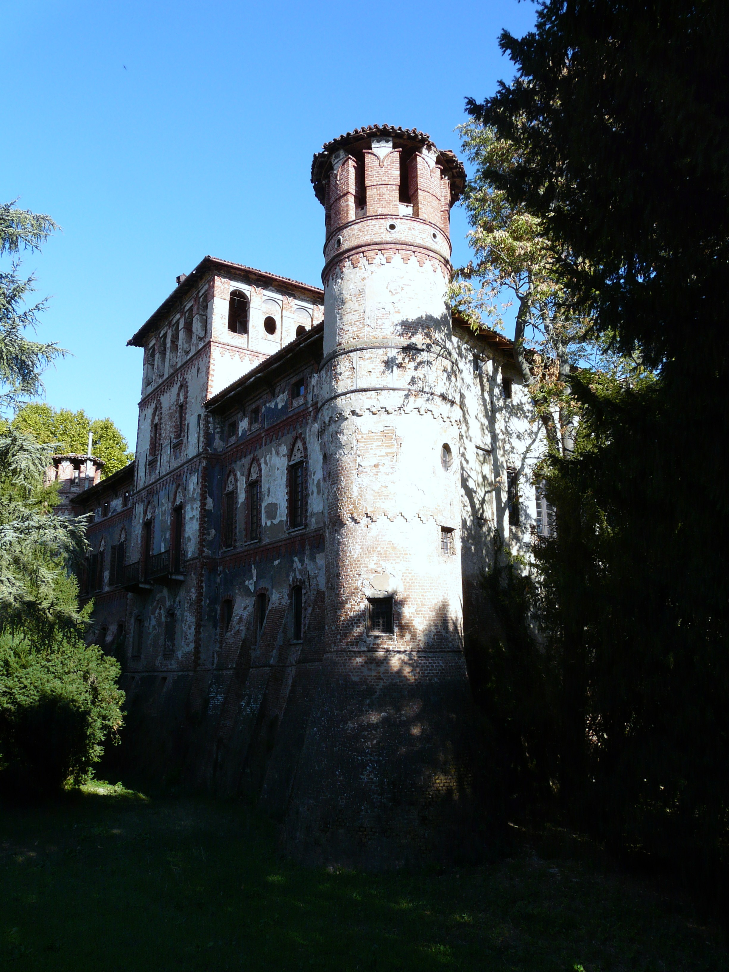 Castello di Piovera, Piemonte, Italy